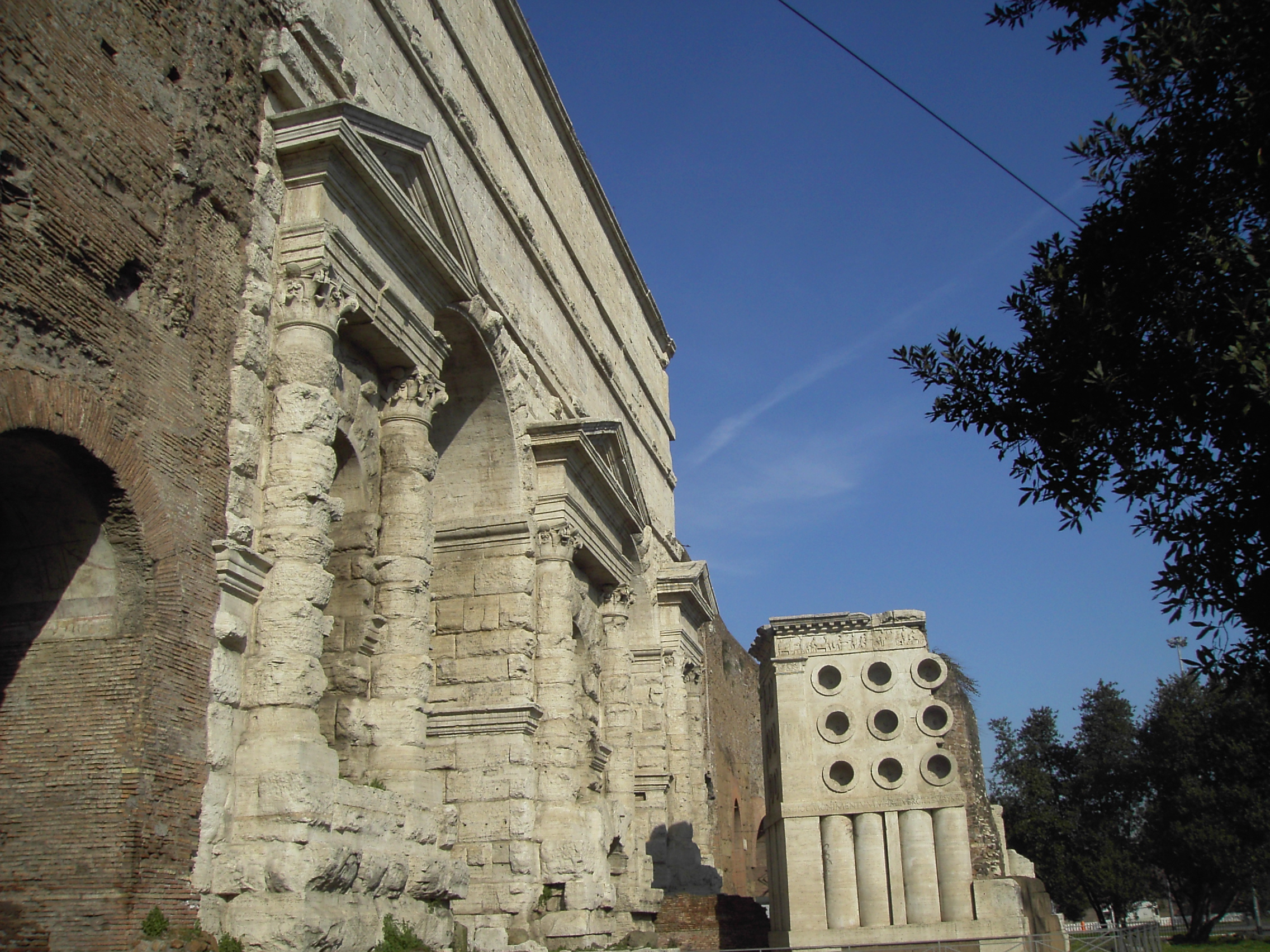 Roma, Porta maggiore e sepolcro del fornaio Eurisace.